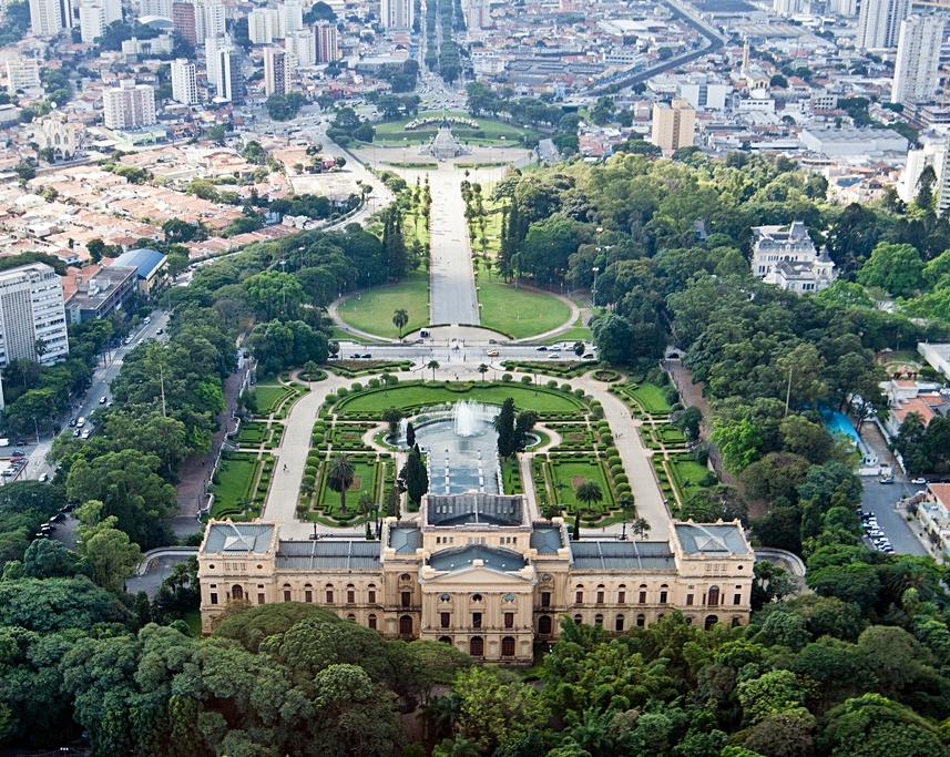 Fotografia aérea do Museu do Ipiranga (ou Paulista), em São Paulo, Brasil.